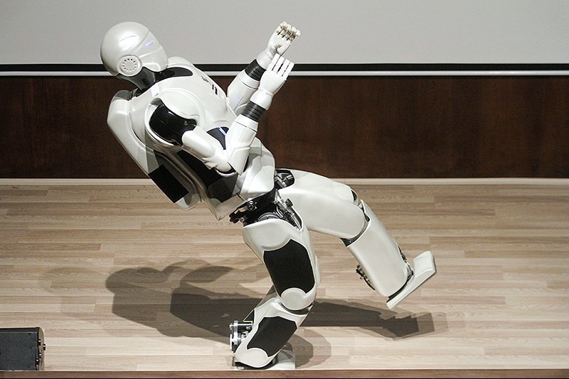 مراسم رونمایی از ربات انسان‌نمای ملی سورنای ۳ صبح امروز دوشنبه ۲۵ آبان ماه با حضور سورنا ستاری معاون علمی و فناوری رئیس جمهور، نیلی رئیس دانشگاه تهران در دانشکده مکانیک برگزار شد.